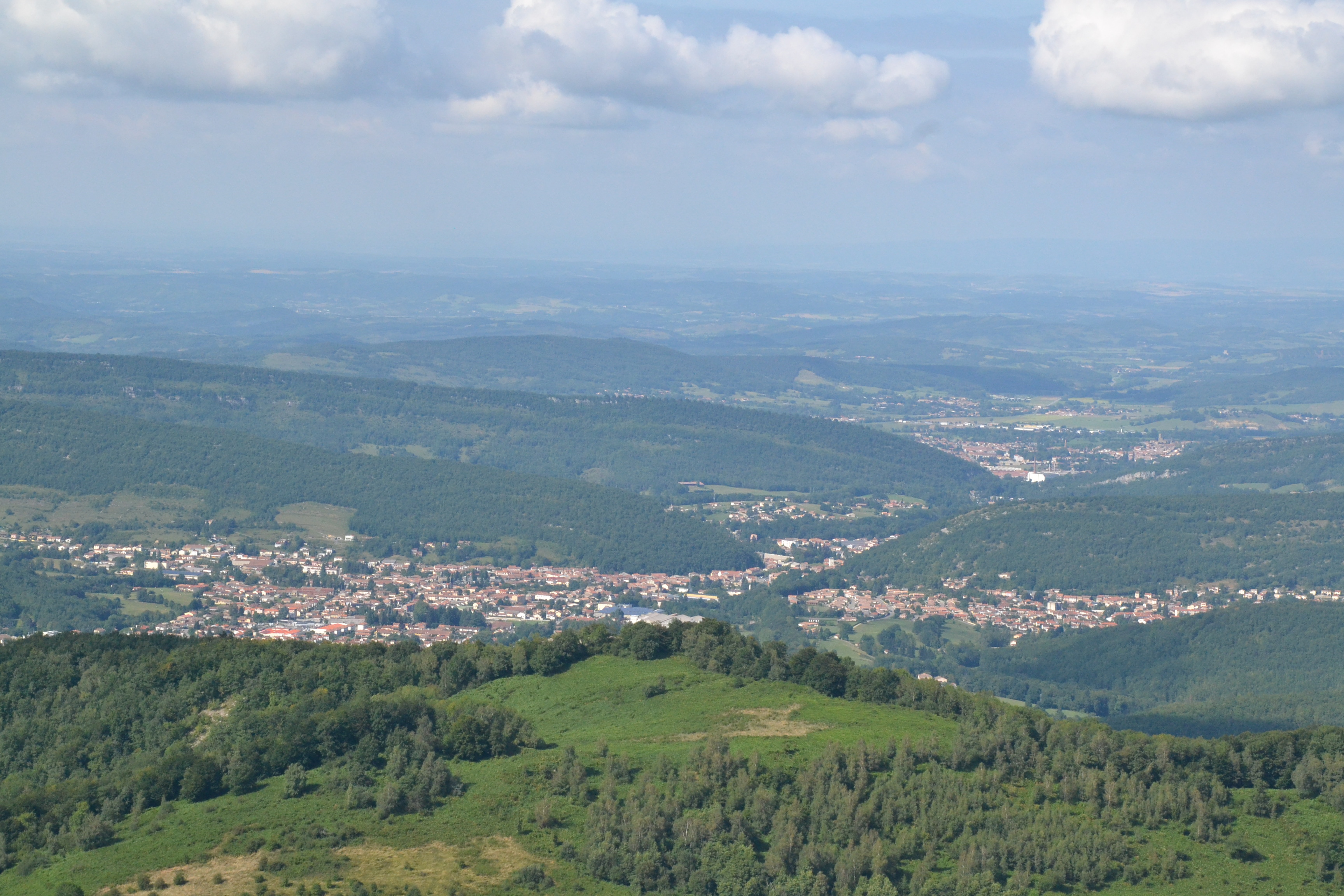 Vue sur le pays d'Olmes (Lavelanet, Laroque-d'Olmes) depuis le château de Montségur (Ariège, France). Les deux cluses du Touyre sont bien visibles.